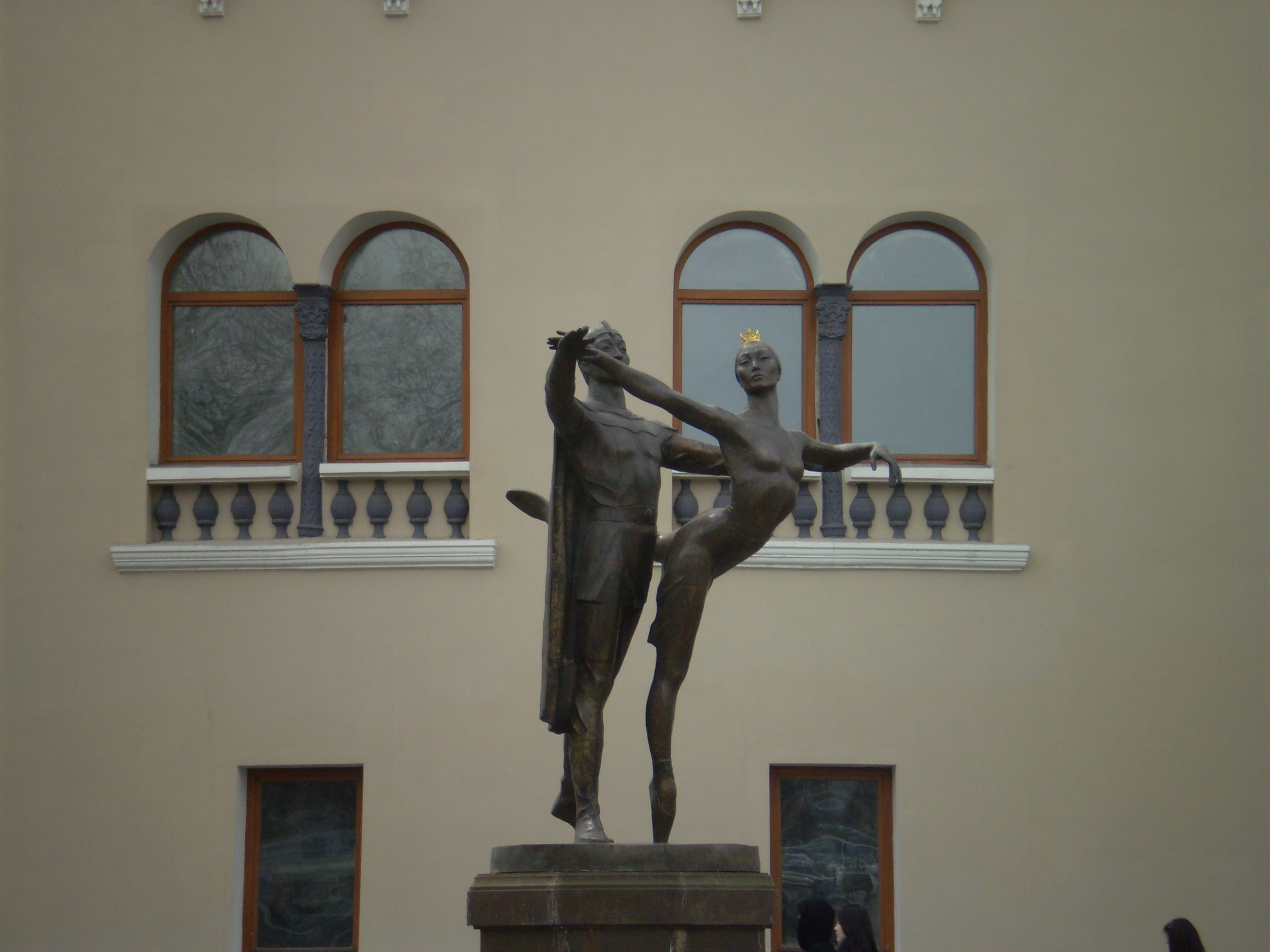 Cкульптурная композиция «Красавица Ангара» (авторы А. Миронов и Д. Уланов).